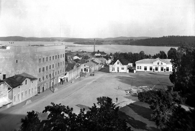 Valtiontalo eli Suojeluskuntatalo Jyväskylä, 1930. Kuva Keski-Suomen museon kokoelmista